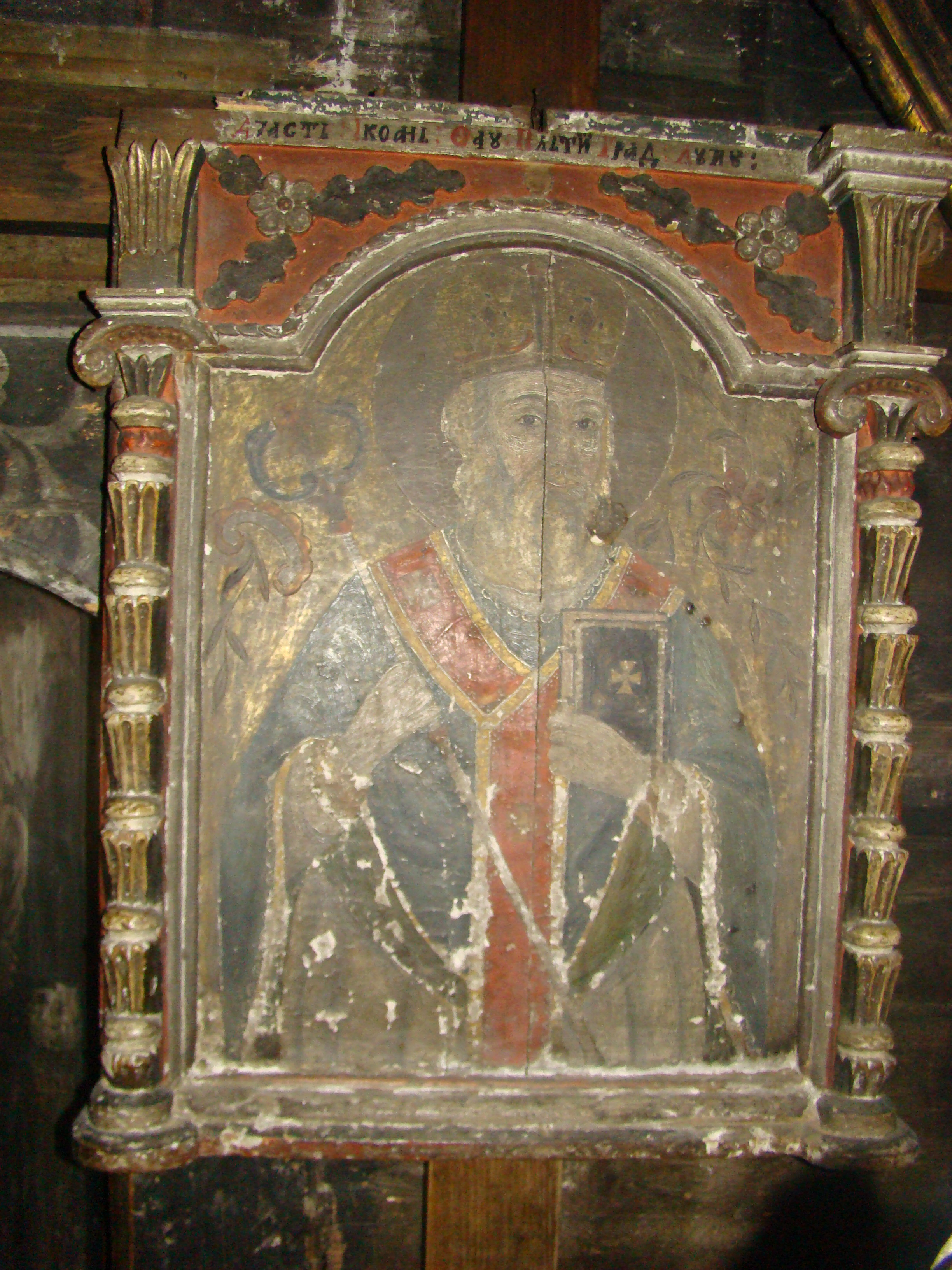 Biserica de lemn "Sfântul Nicolae" (a Nistoreştilor) , oraş SĂLIŞTEA DE SUS